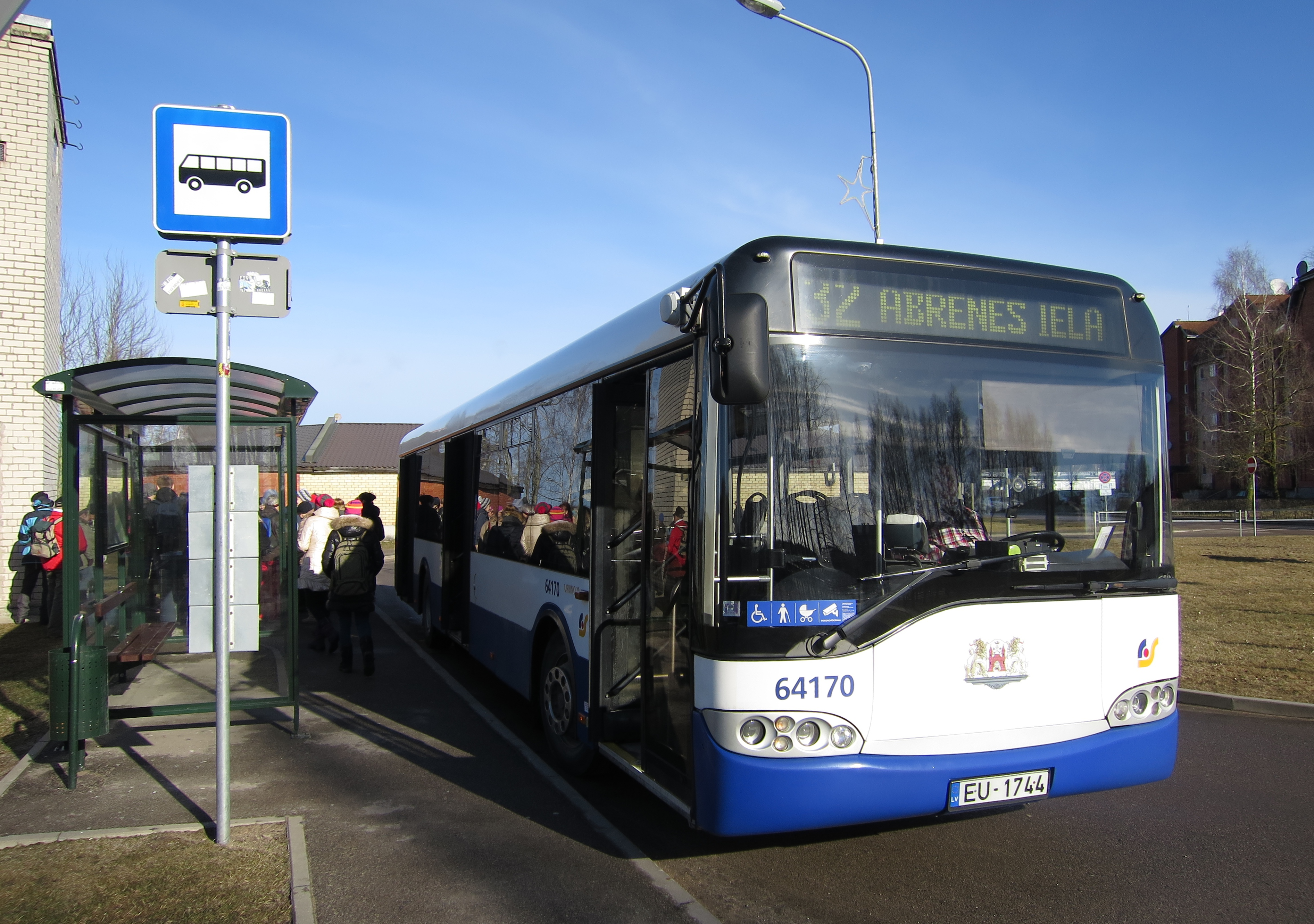 32. autobuss galapunktā Piņķos, Meistaru ielā